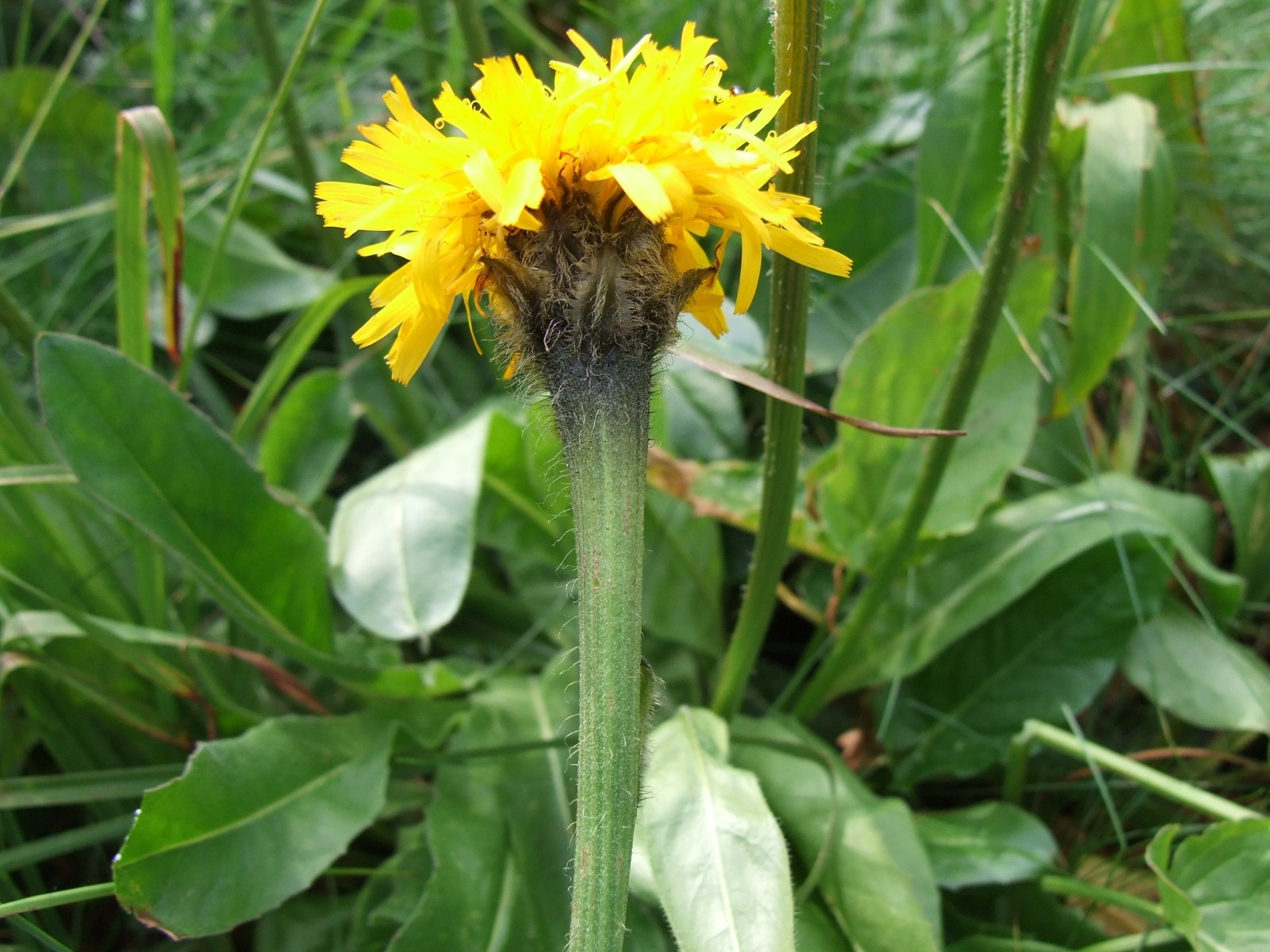 Hypochaeris uniflora (pl. prosienicznik jednogłówkowy), habitat: Spalona Dolina, West Tatra Mountains